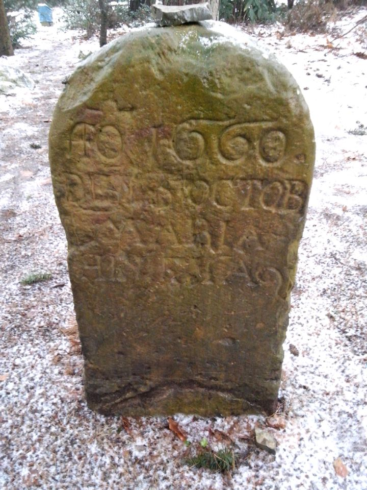 Mordsteine Bielefeld-Sennestadt. Baudenkmal. Hier Gedenkstein für die ermordete Tochter. Vorderseite.